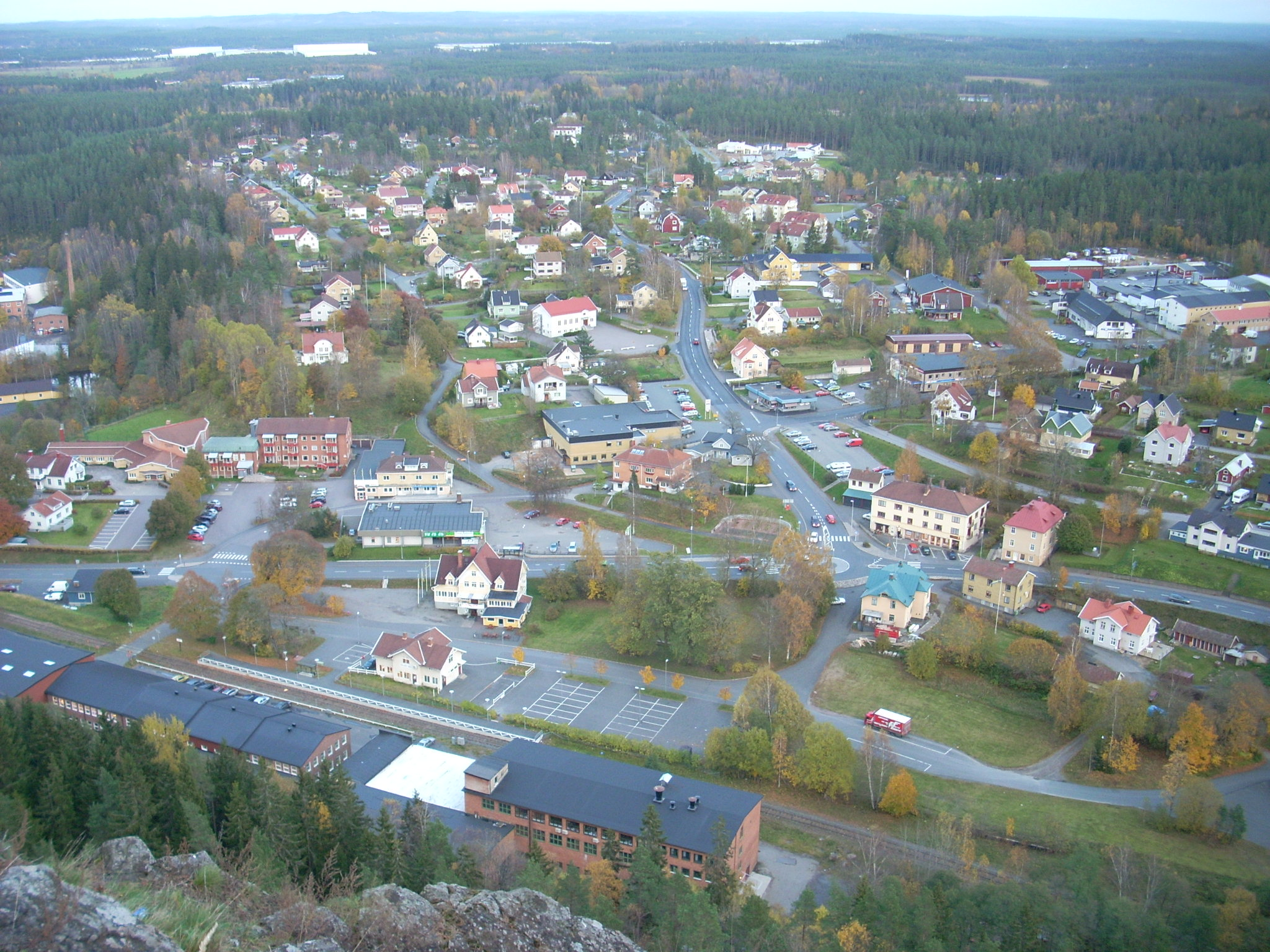 Samhället Taberg i Jönköpings kommun, sett från toppen på berget Taberg.